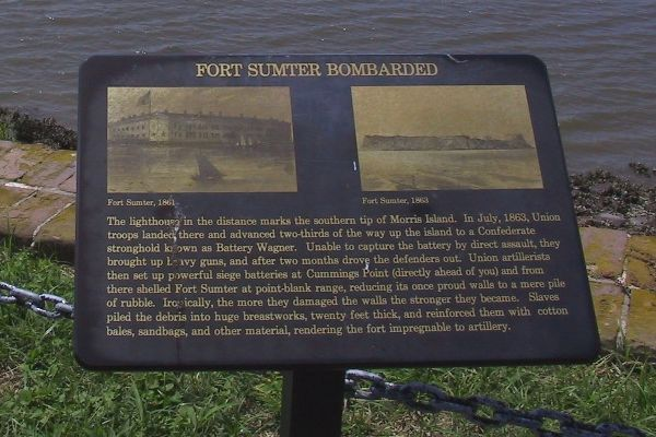 Fort Sumter antes y después del bombardeo confederado de 1861.